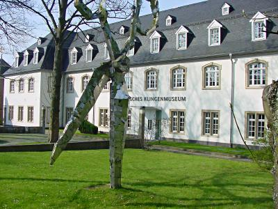 Deutsches Klingenmuseum (Original text: Deutsches Klingenmuseum) Andere Versionen